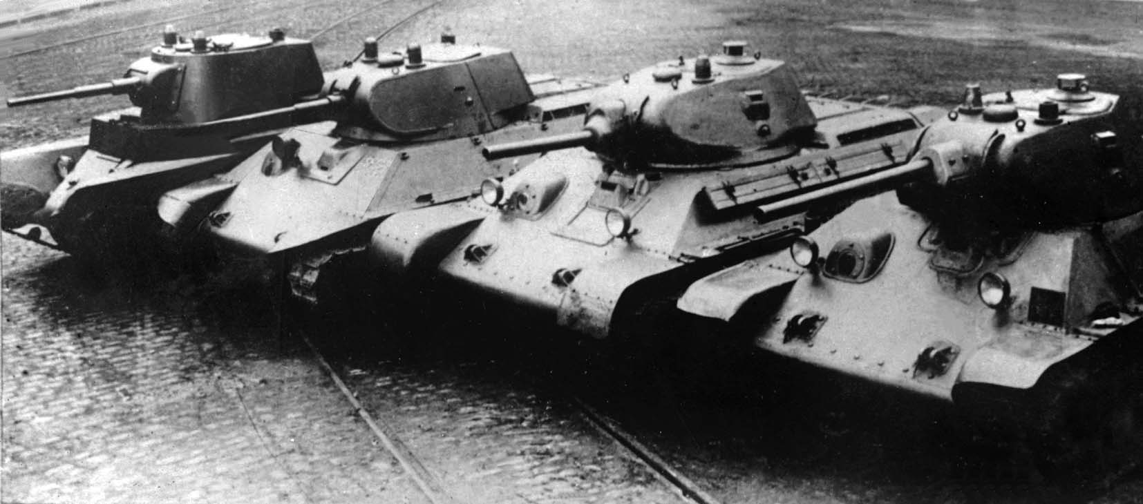 Panzer aus der Produktion des Werkes Nr. 183. V.l.n.r.: A-8 (BT-7M), A-20, T-34 Modell 1940 (Kanone L-11), T-34 Modell 1941 (Kanone F-34)